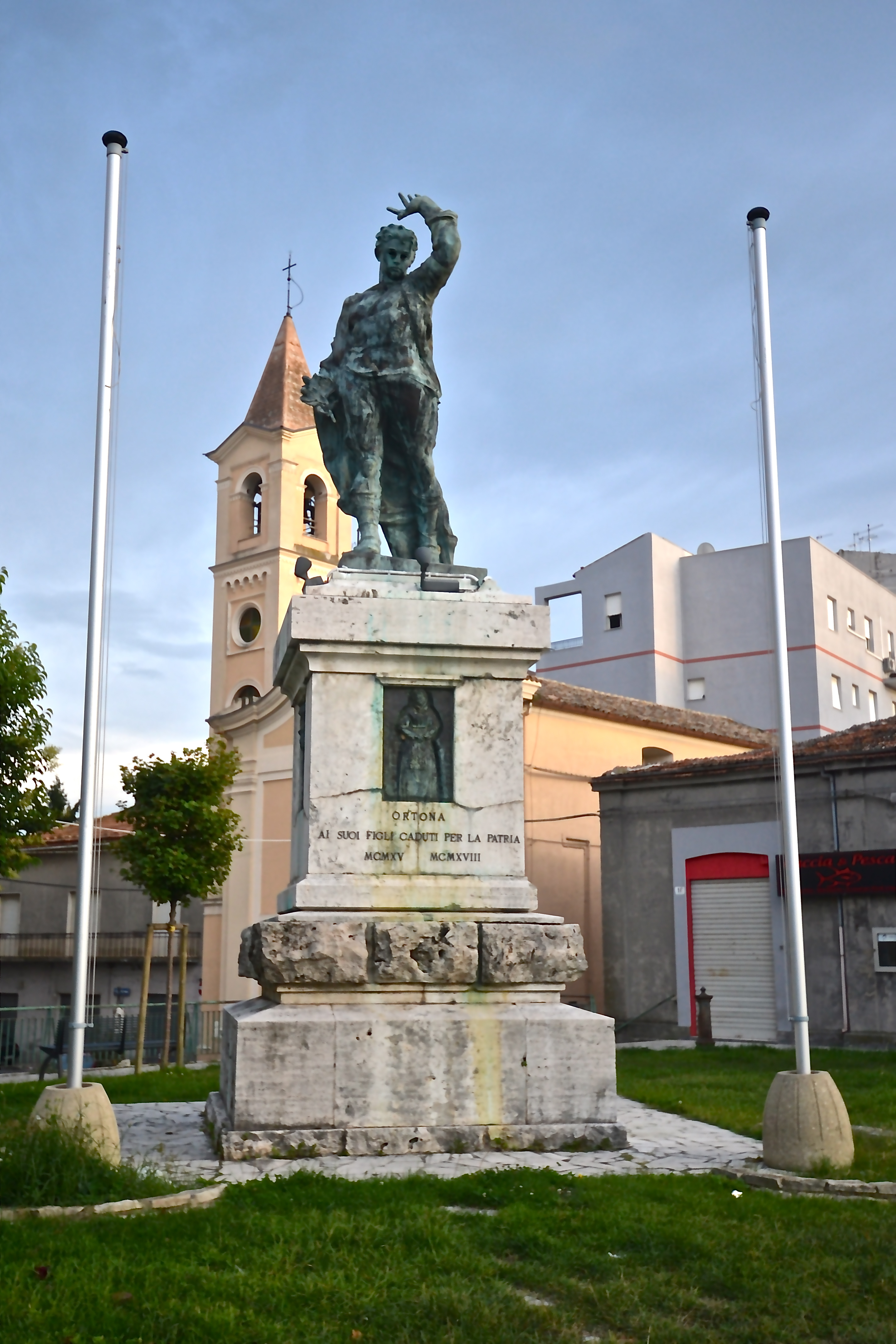 Monumento ai Caduti di tutte le guerre This is a photo of a monument which is part of cultural heritage of Italy.